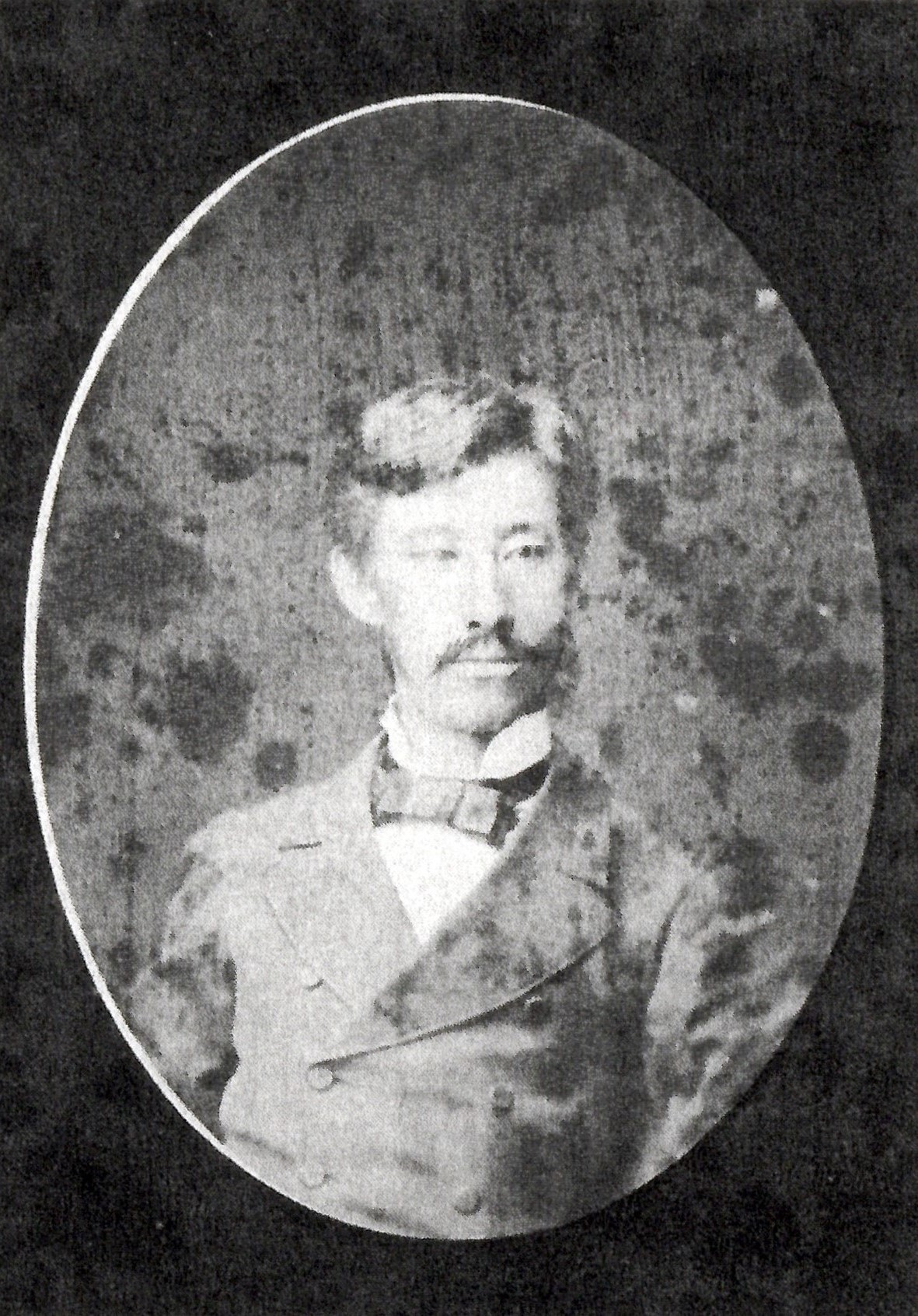 伊達宗敦の肖像写真。